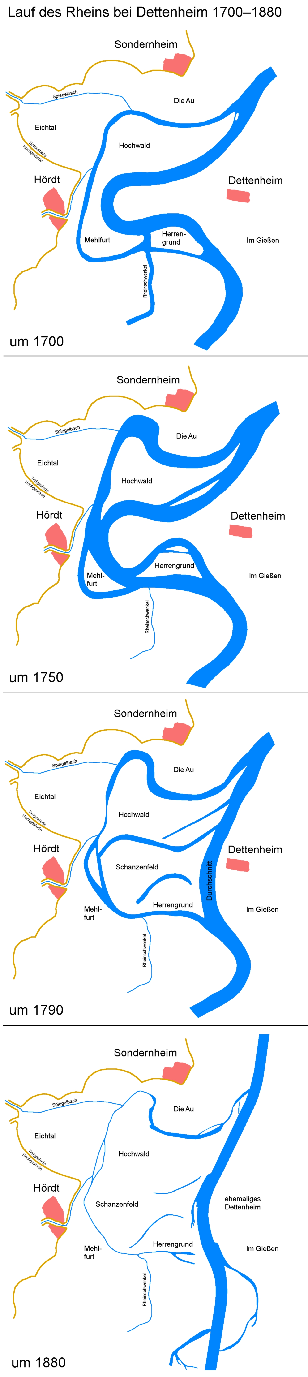 Lauf des Rheins bei Dettenheim, Sondernheim und Hördt um 1700, 1750, 1790 und 1880. Vereinfachte Darstellung nach: Heinz Musall: Die Entwicklung der Kulturlandschaft der Rheinniederung zwischen Karlsruhe und Speyer vom Ende des 16. bis zum Ende des 19. Jahrhunderts. (= Heidelberger Geographische Arbeiten, Heft 22) Geographisches Institut der Universität Heidelberg, Heidelberg 1969, Karte 41 sowie Karte 2 bis 4.